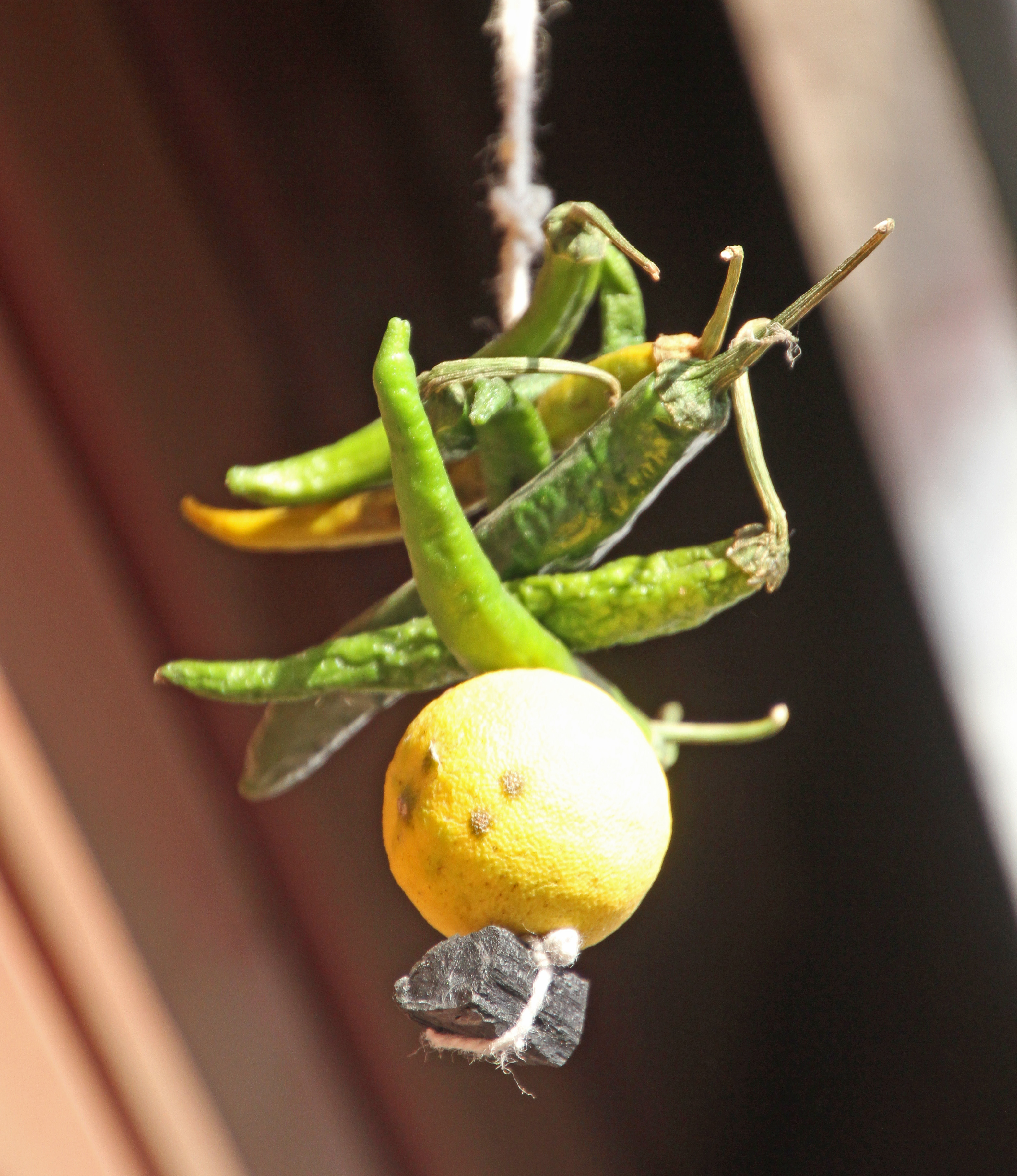 Udaipur